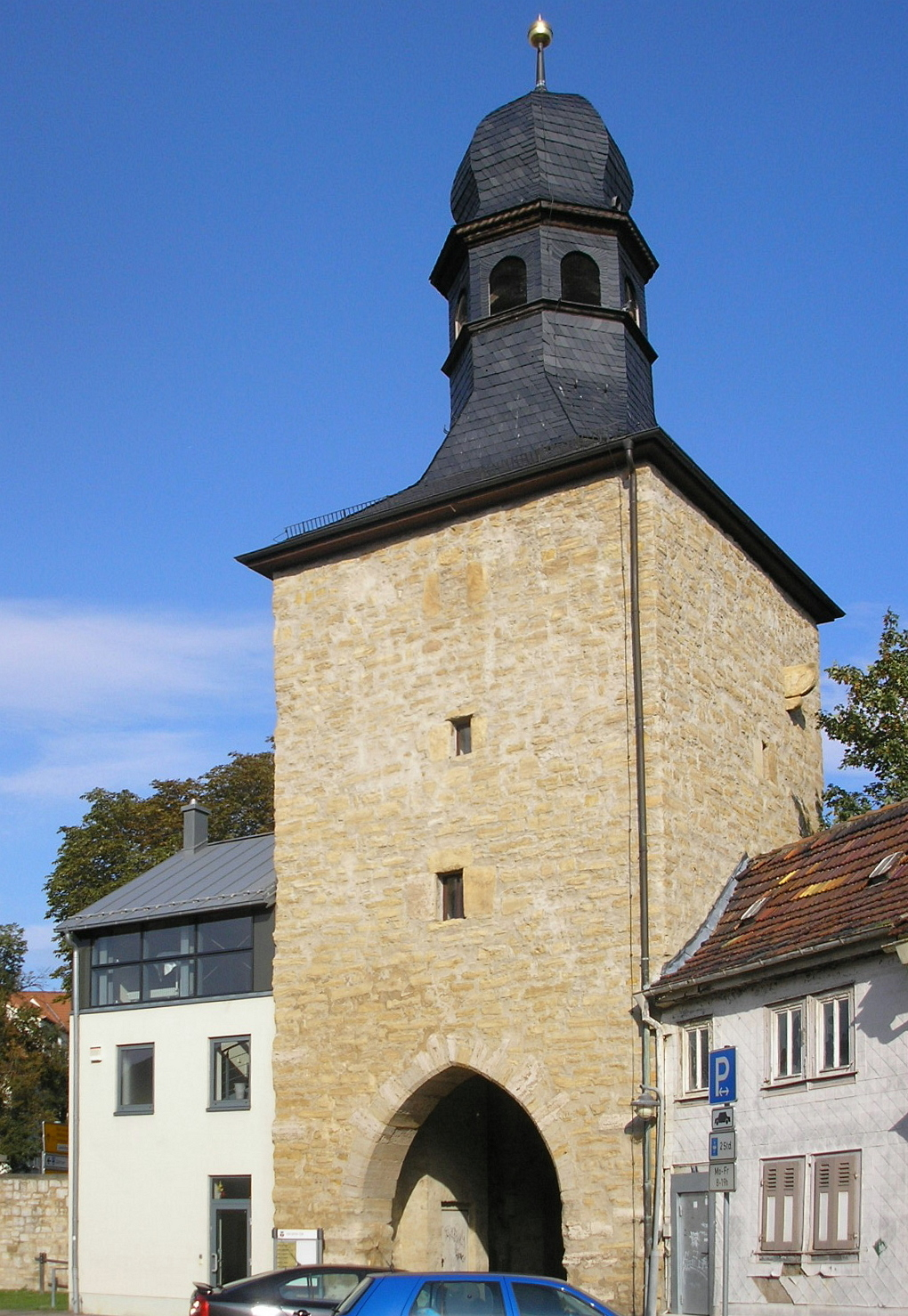 Das Erfurter Tor in Sömmerda (Thüringen).